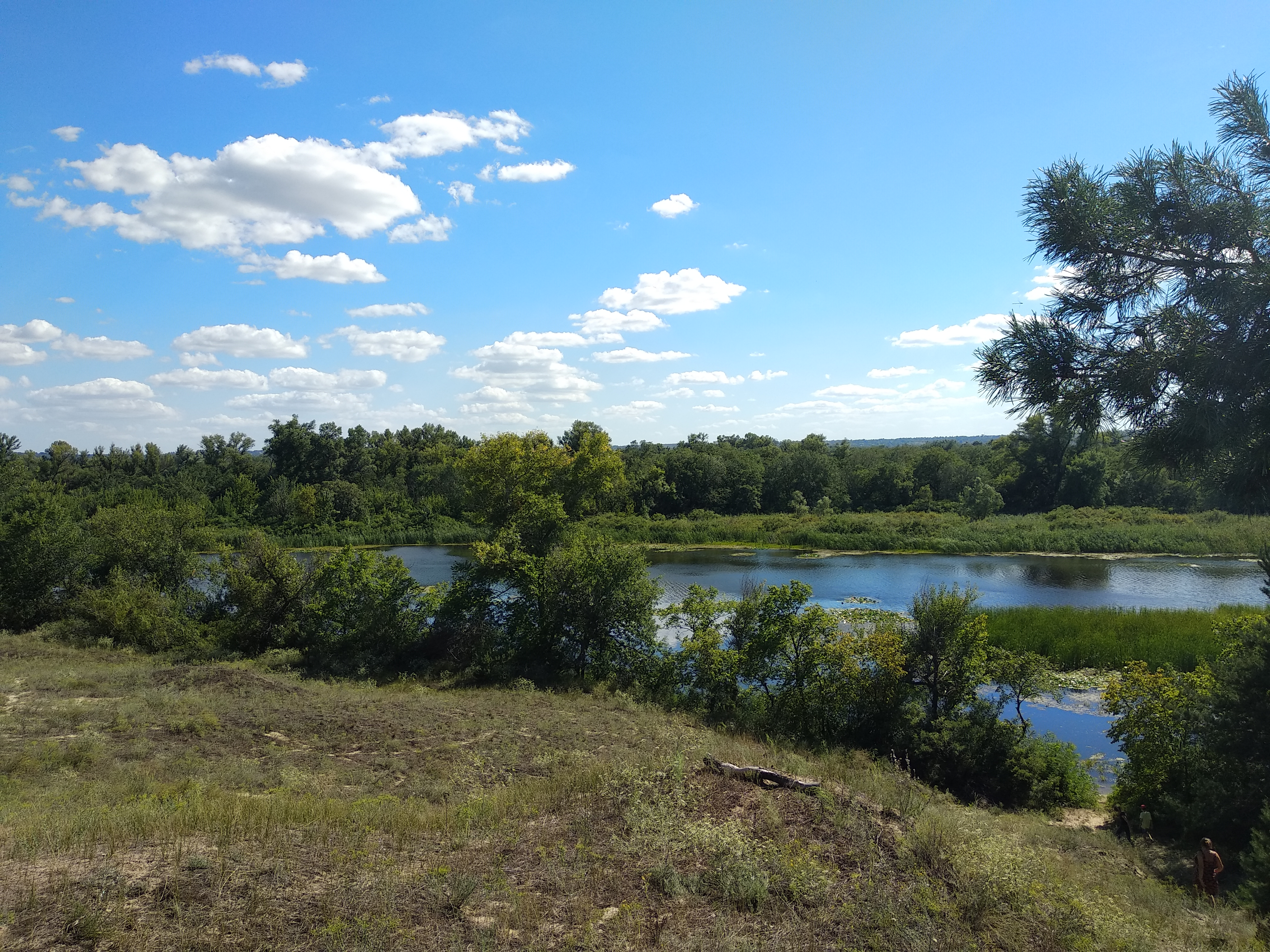 Дніпровсько-Орільський, Дніпропетровський та Петриківський райони, Орільське лісництво